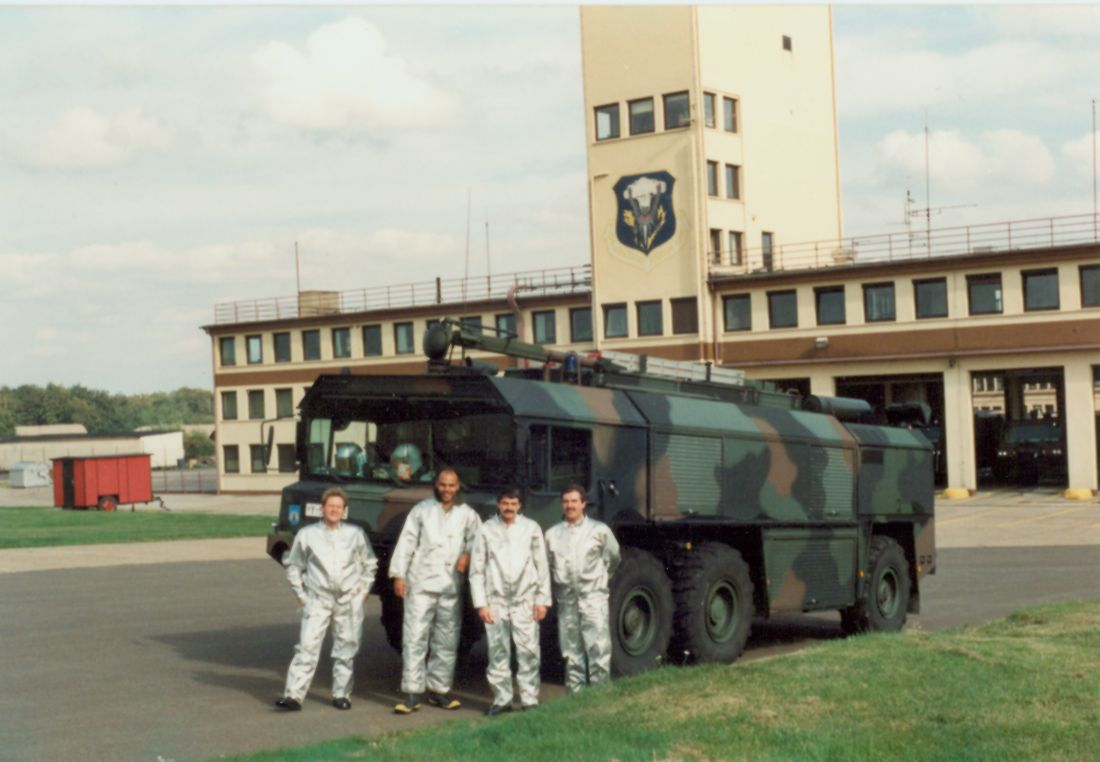 BW Feuerwehrfahrzeug TLF 3500 mit Feuerwehrleuten der Bundeswehr-Feuerwehr und der Hahn Air Base Feuerwehr beim Info Tag und erstem Testflug der Lufthansa am 13.09.1992 mit Landung auf dem Zivilflughafen Frankfurt-Hahn, damals: Rhein-Mosel-Flughafen